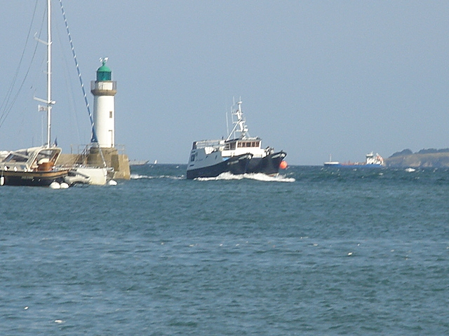 chalutier catamaran rentrant au port de Palais (56).